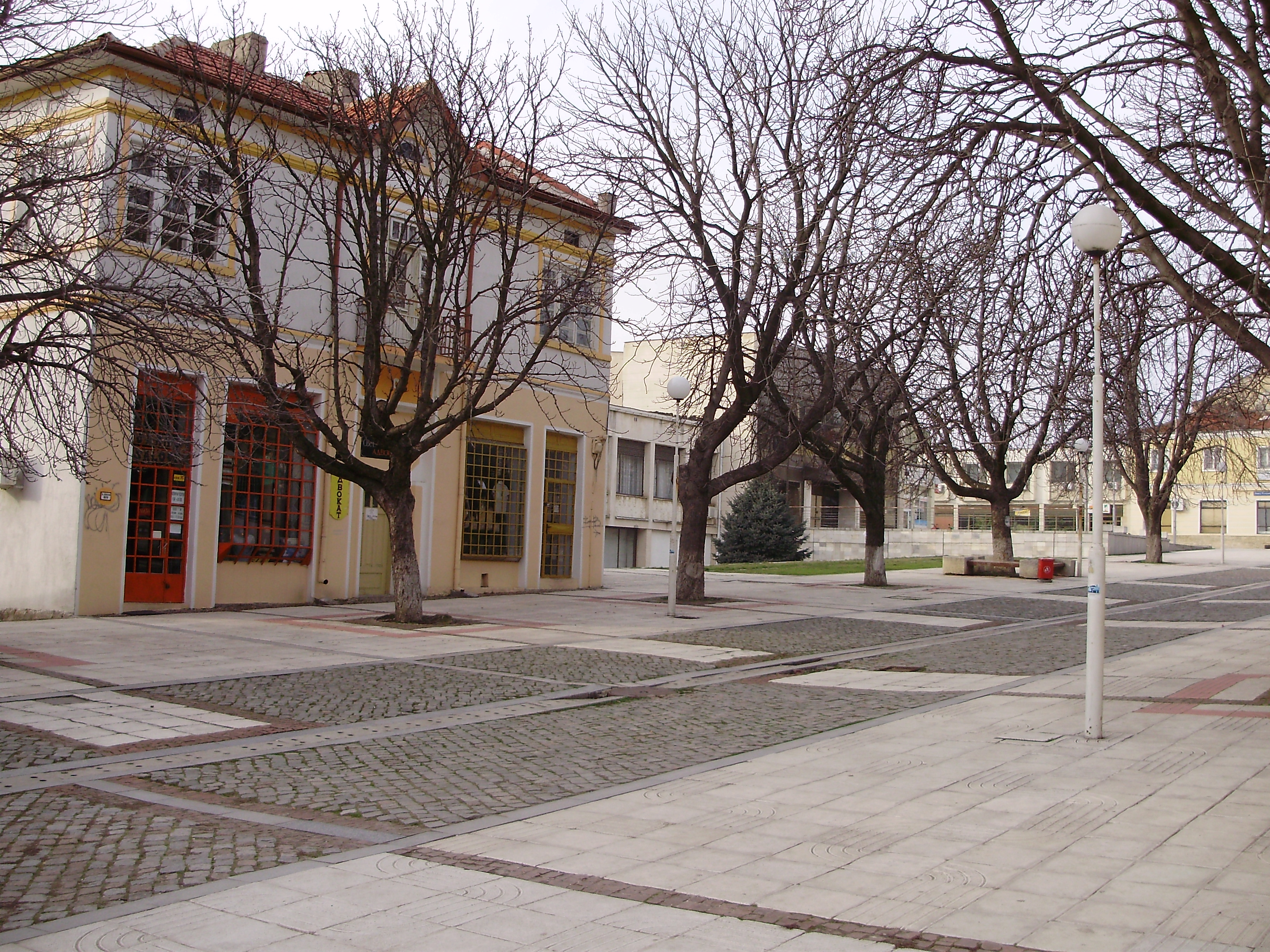 Централната част на град Исперих